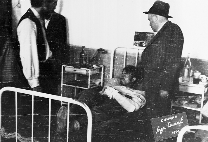 Српски (ћирилица): Капетан Раковић и др Мехмед Хоџић у обиласку рањеника у болници у Јездини код Чачка.